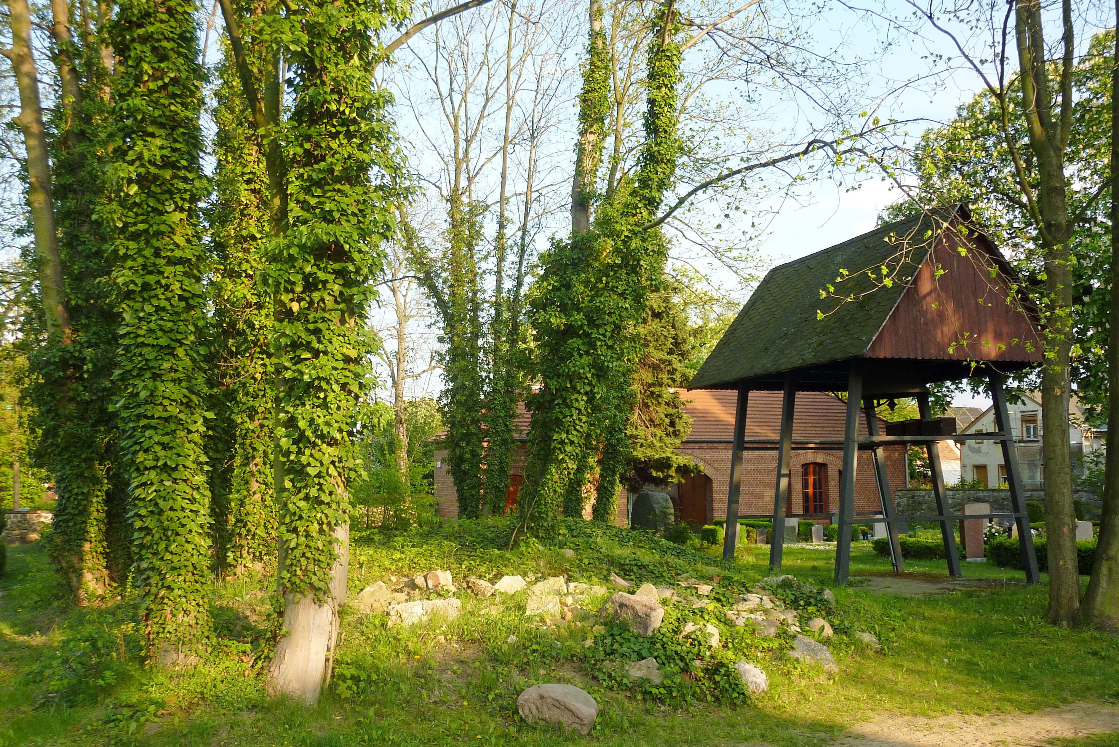 Mit Bäumen markierter Trümmerhügel und Standort der zerstörten Dorfkirche in Berlin-Wartenberg. Daneben ein hölzerner Glockenträger.